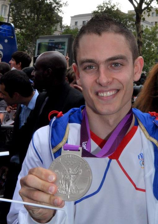 Michael D'Almeida au défilé des médaillés français des JO 2012